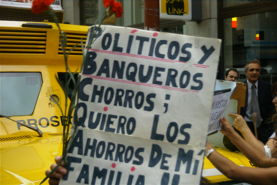 Manifestación de ahorristas argentinos contra el Corralito financiero que obstruyen el paso de un camión de caudales en las inmediaciones de Sarmiento y San Martín, Buenos Aires, Argentina.